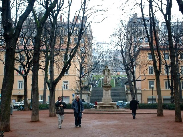 Place Sathonay, Lyon